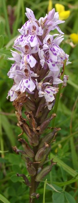 Photo by Ramin Nakisa.